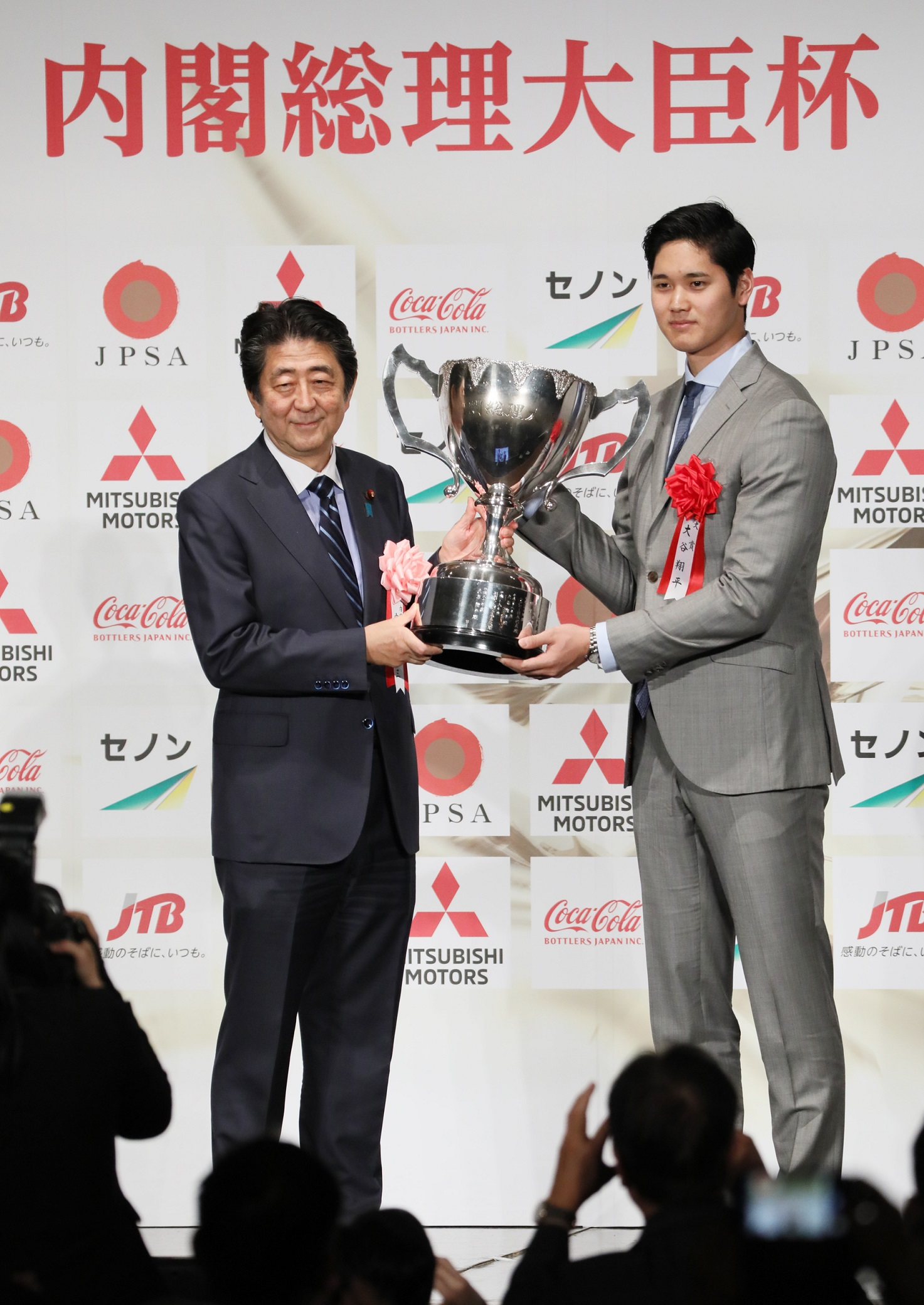 内閣総理大臣杯日本プロスポーツ大賞受賞式典。 内閣総理大臣杯を授与する安倍総理。